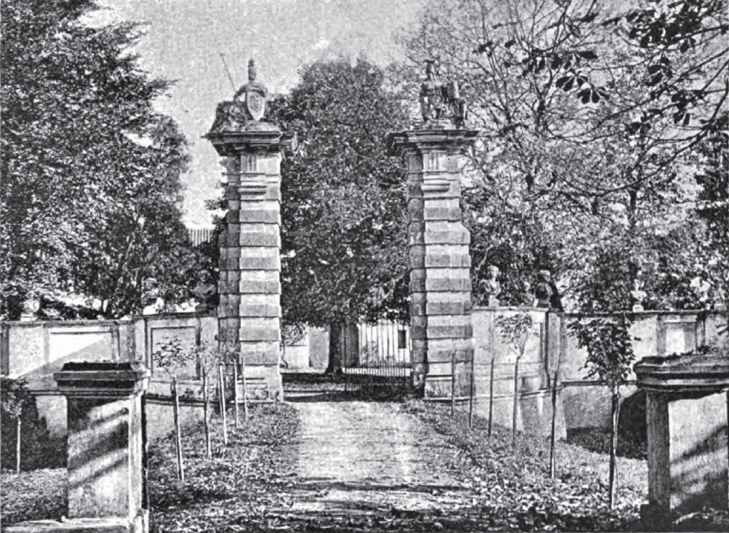 Portal des Hauses Empel in Rees-Empel